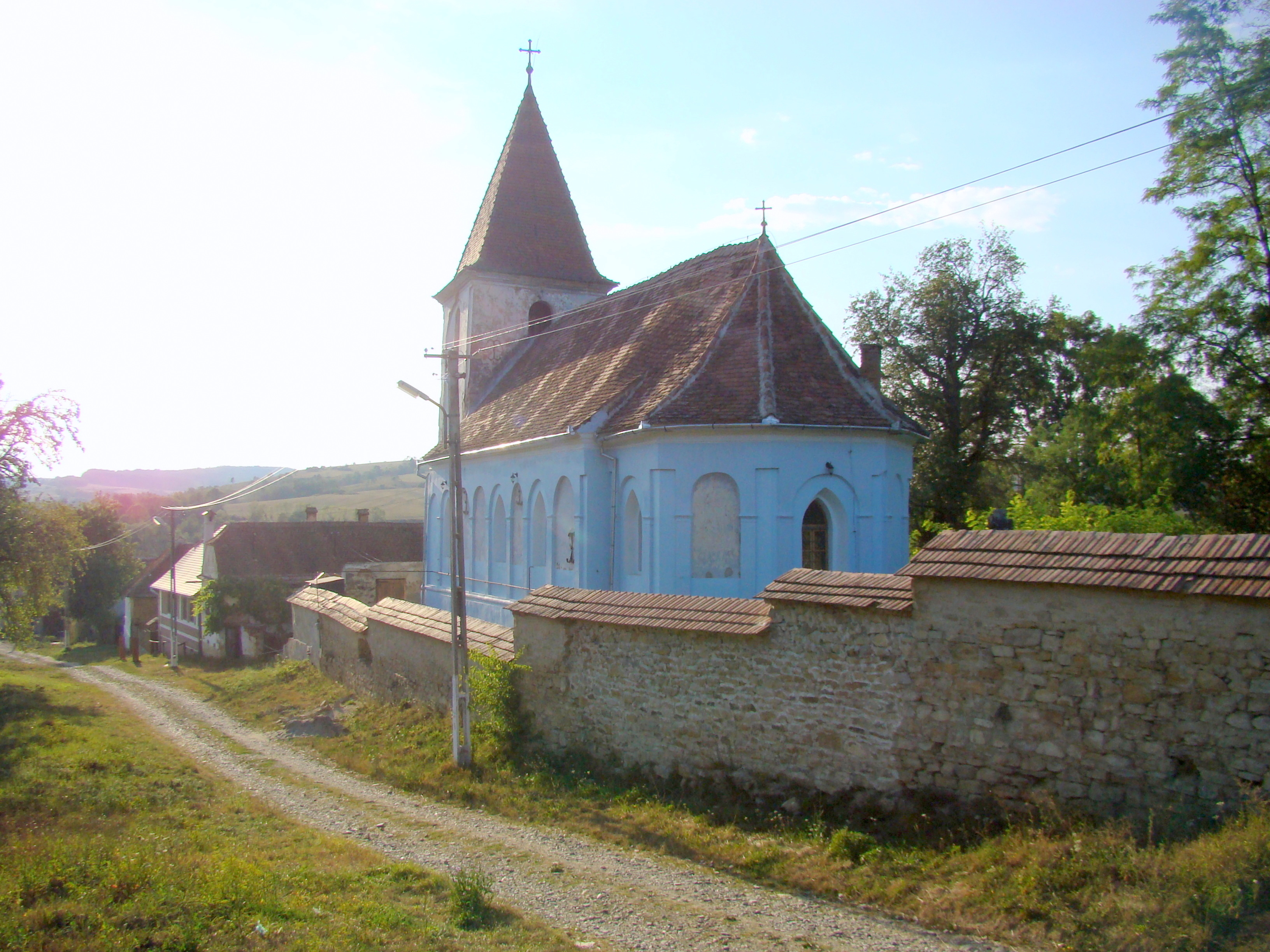 Biserica "Adormirea Maicii Domnului", sat SĂSĂUŞ; comuna CHIRPĂR